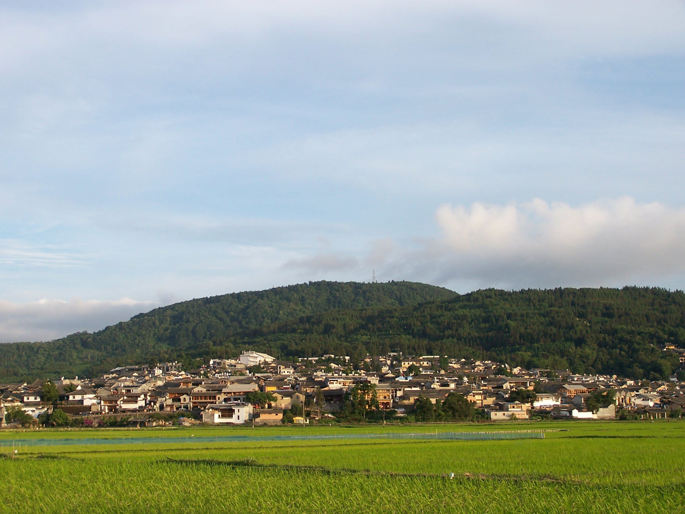 Heshun Tengchong